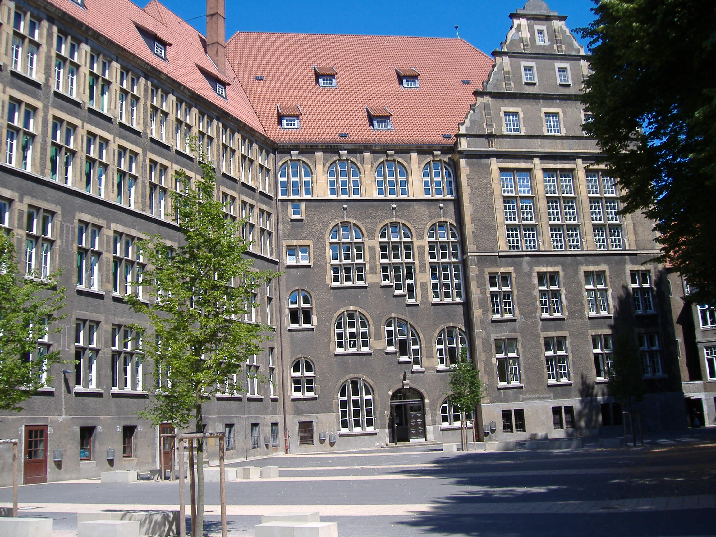 Schulhof des HBG in Bremen (2006)